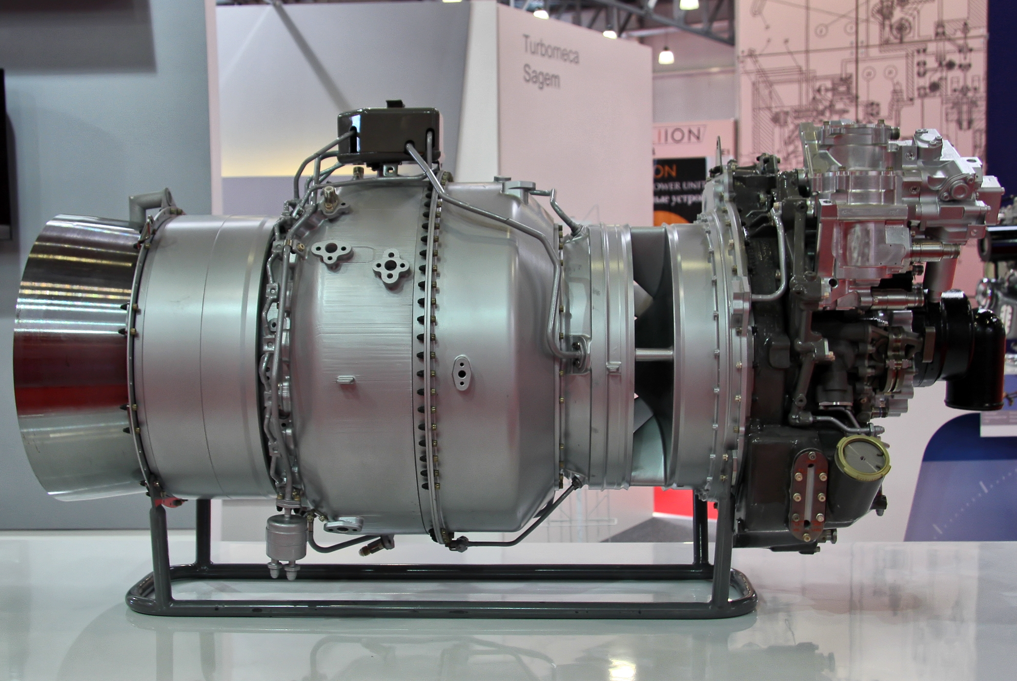 Turbomeca Ardiden 3G engine for Ka-62